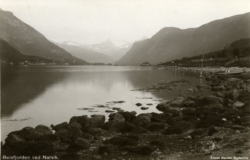 Ankenes strandsone, sett fra Ankenesleira mot Fagernesfjellet (Narvik). Ankenes Torg ligger i dag der kirkegården på bildet er.